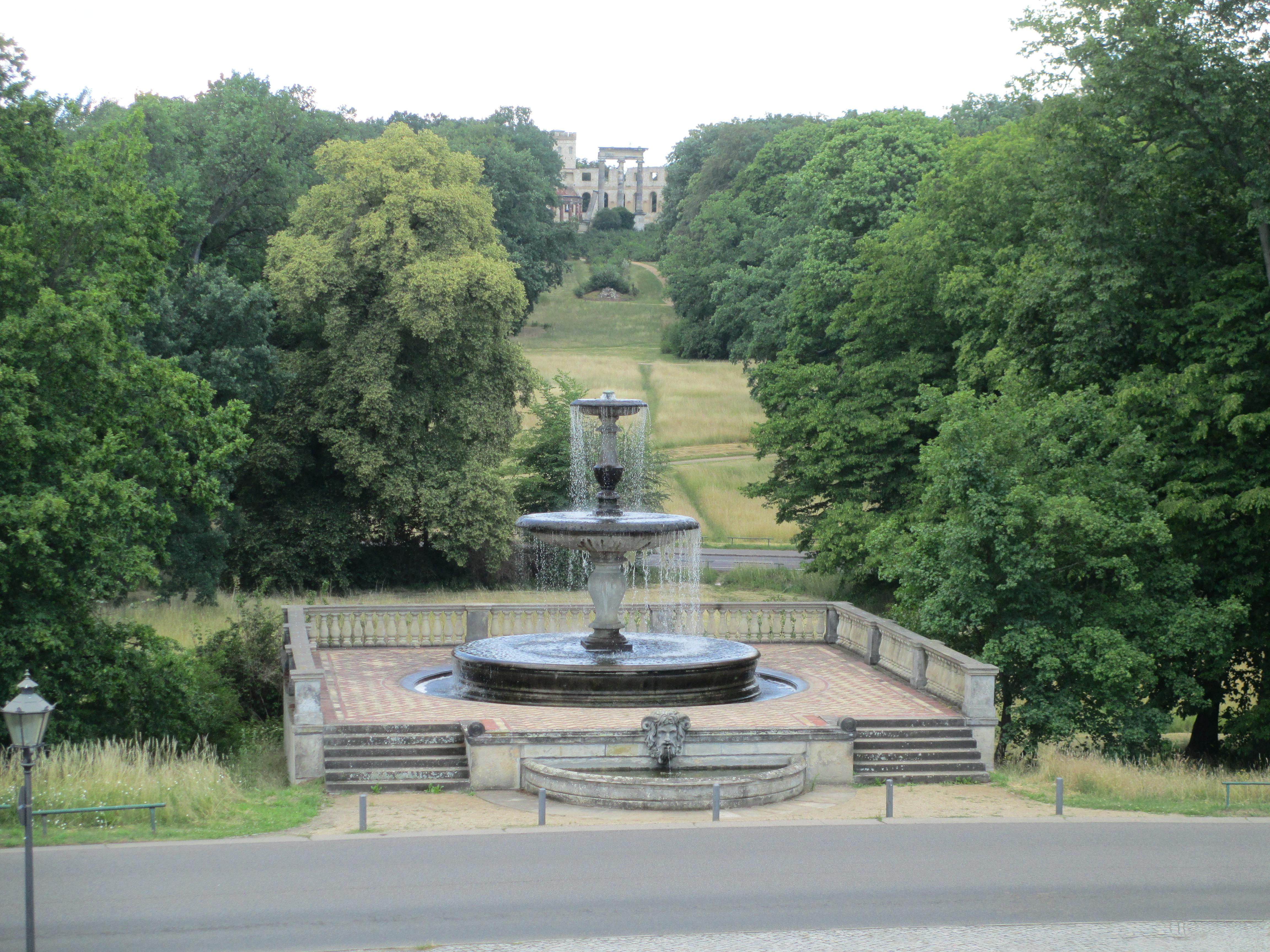 מזרקת רוסברונן בסנסוסי